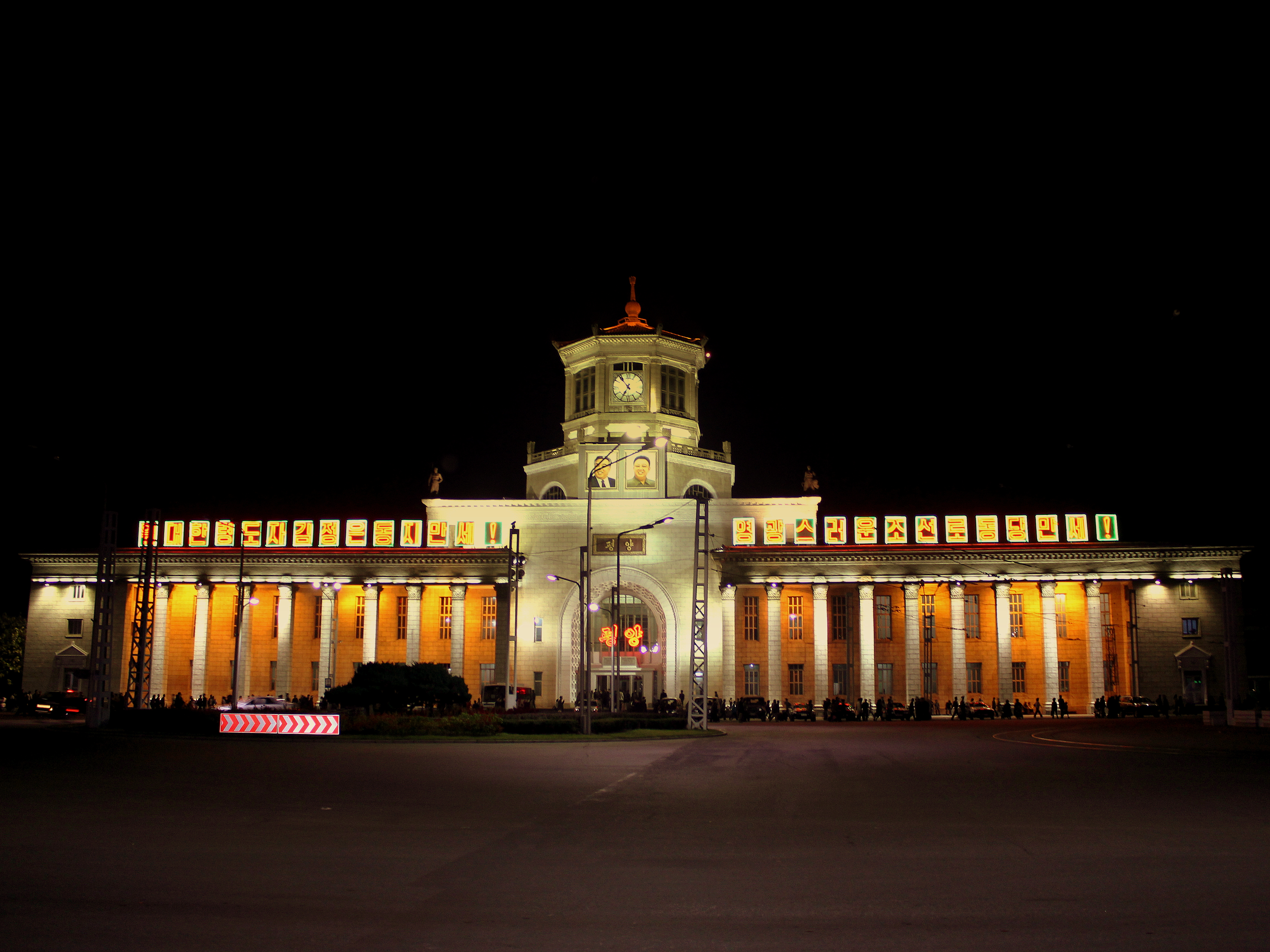 PYONGYANG RAILWAY STATION PYONGYANG CITY DPR KOREA OCT 2012